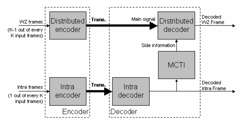 modelo stanford es un esquema de codificador/descodificador DVC